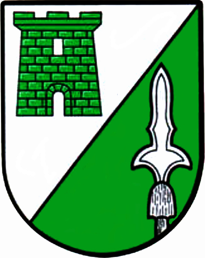 Wappen der Gemeinde Turnau